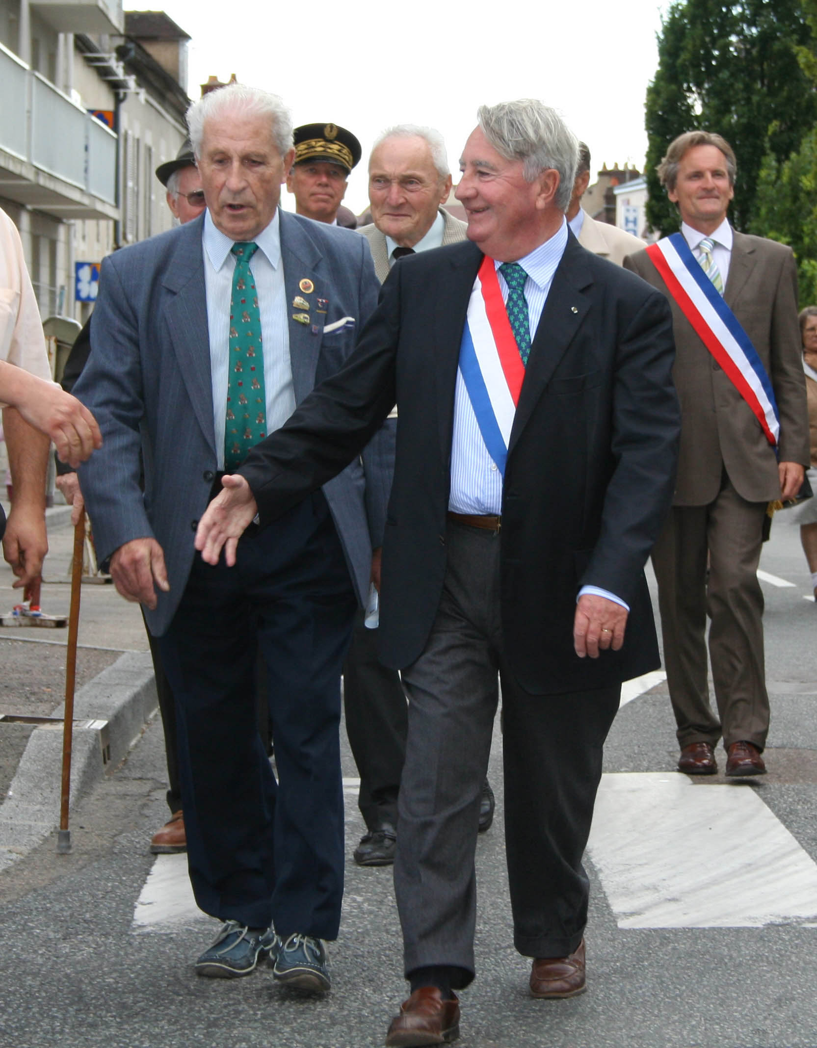 Jean-Pierre Soisson, le 24 août 2006 lors des commémorations du 62é anniversaire de la libération d'Auxerre. À sa gauche, l'actuel maire d'Auxerre (2001-2009), Guy Ferez. (Gérald MERCIER, L’indépendant de l’Yonne, édition du Vendredi 25 août 2006).